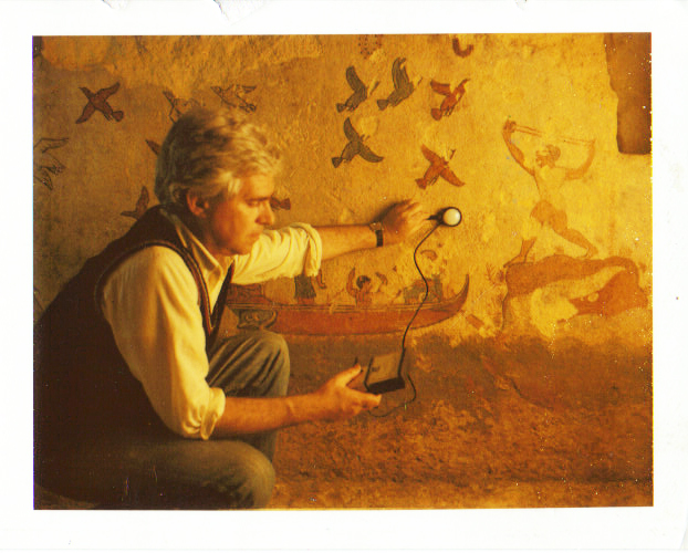 Claudio Bettini , 1983 durante il lavoro di monitoraggio termo -igrometrico nella Tomba Caccia e Pesca a Tarquinia